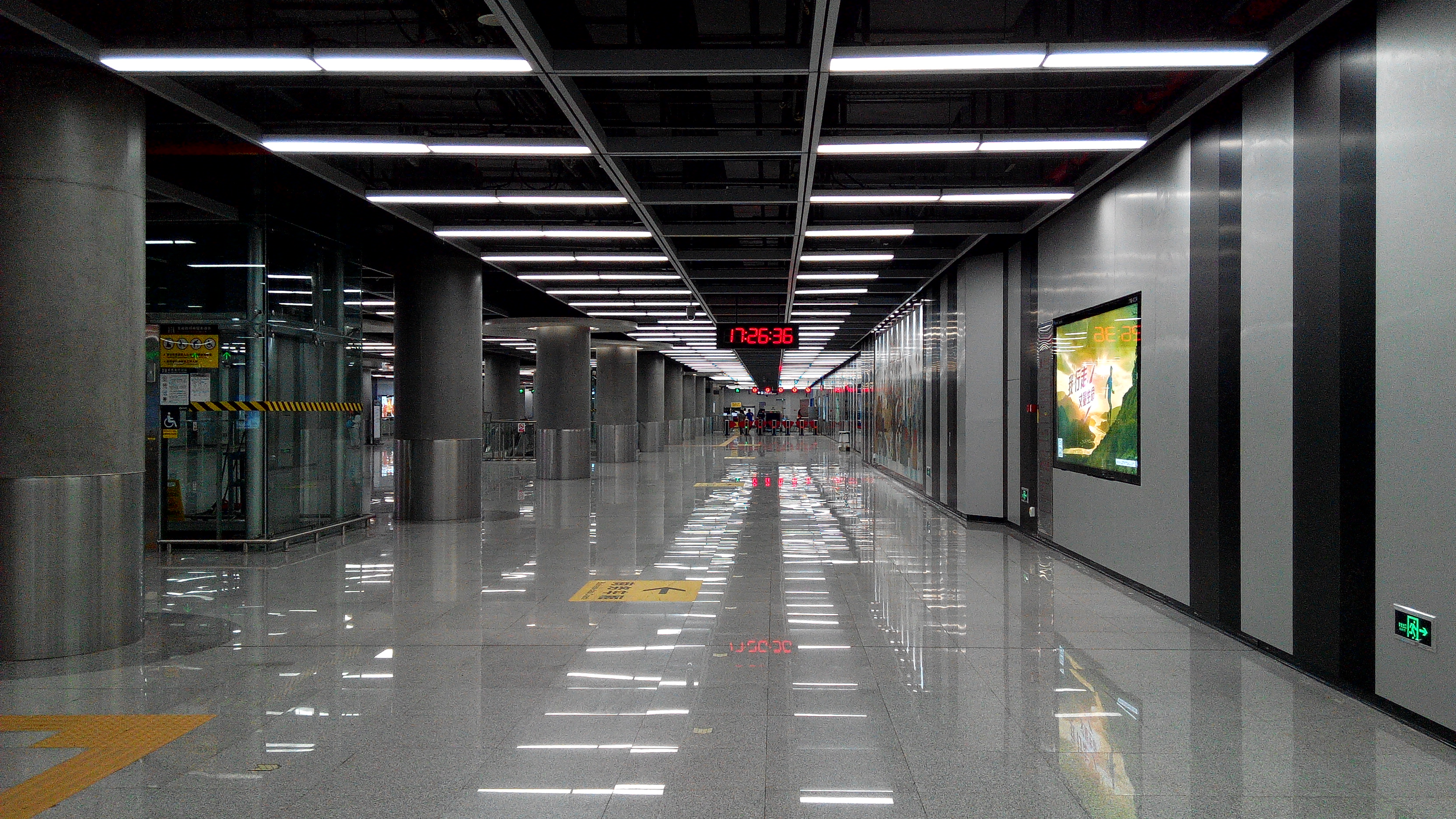 深圳地铁11号线 南山站站厅